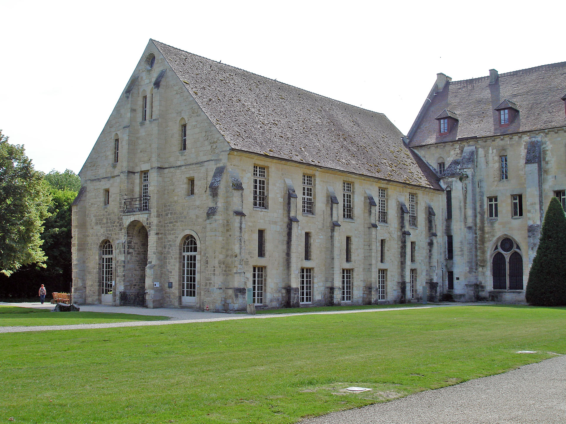 Le bâtiment des latrines de l'abbaye de Royaumont, Val-d'Oise, France.